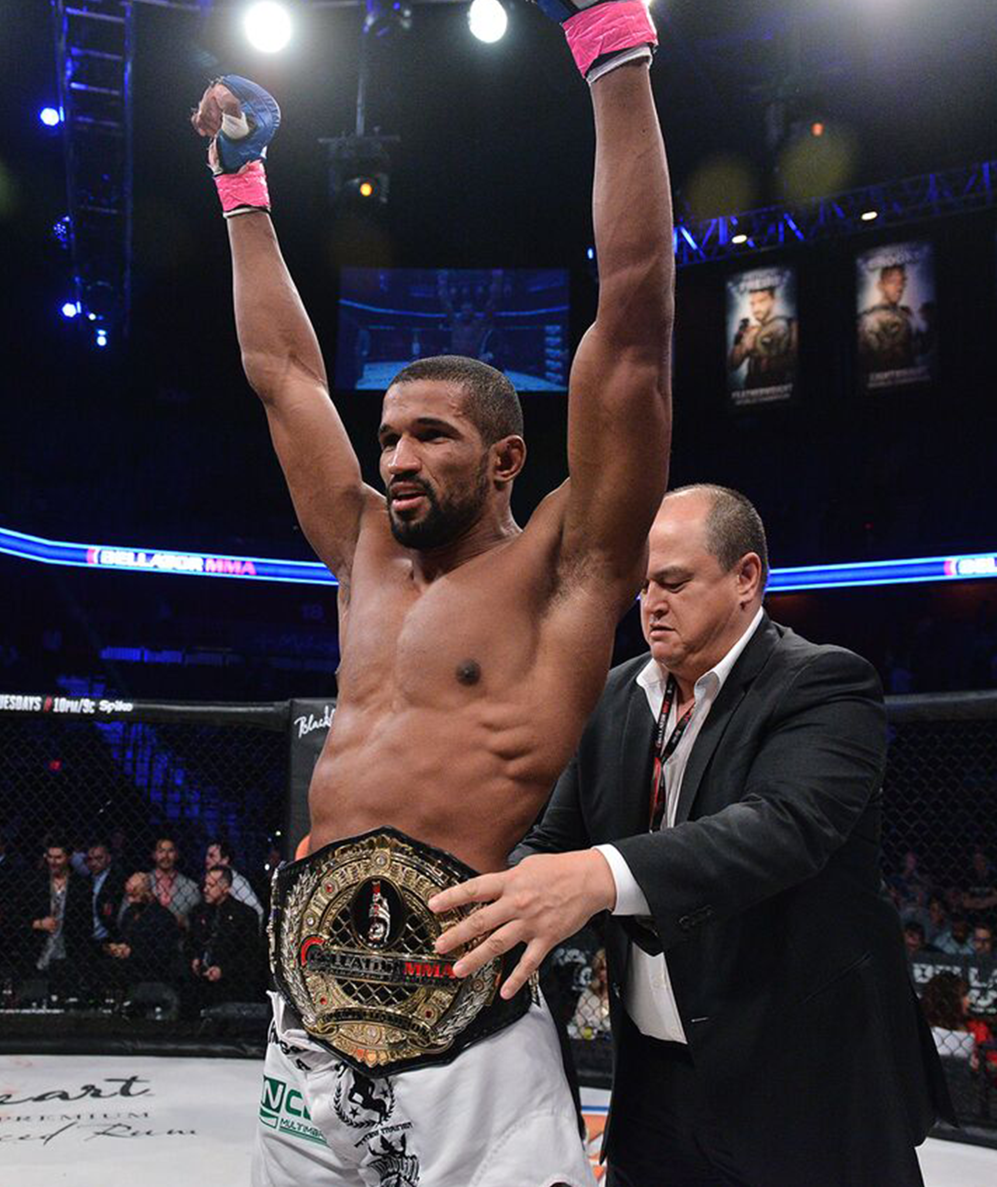 Rafael Carvalho de Souza / Middleweight Champion Bellator MMA